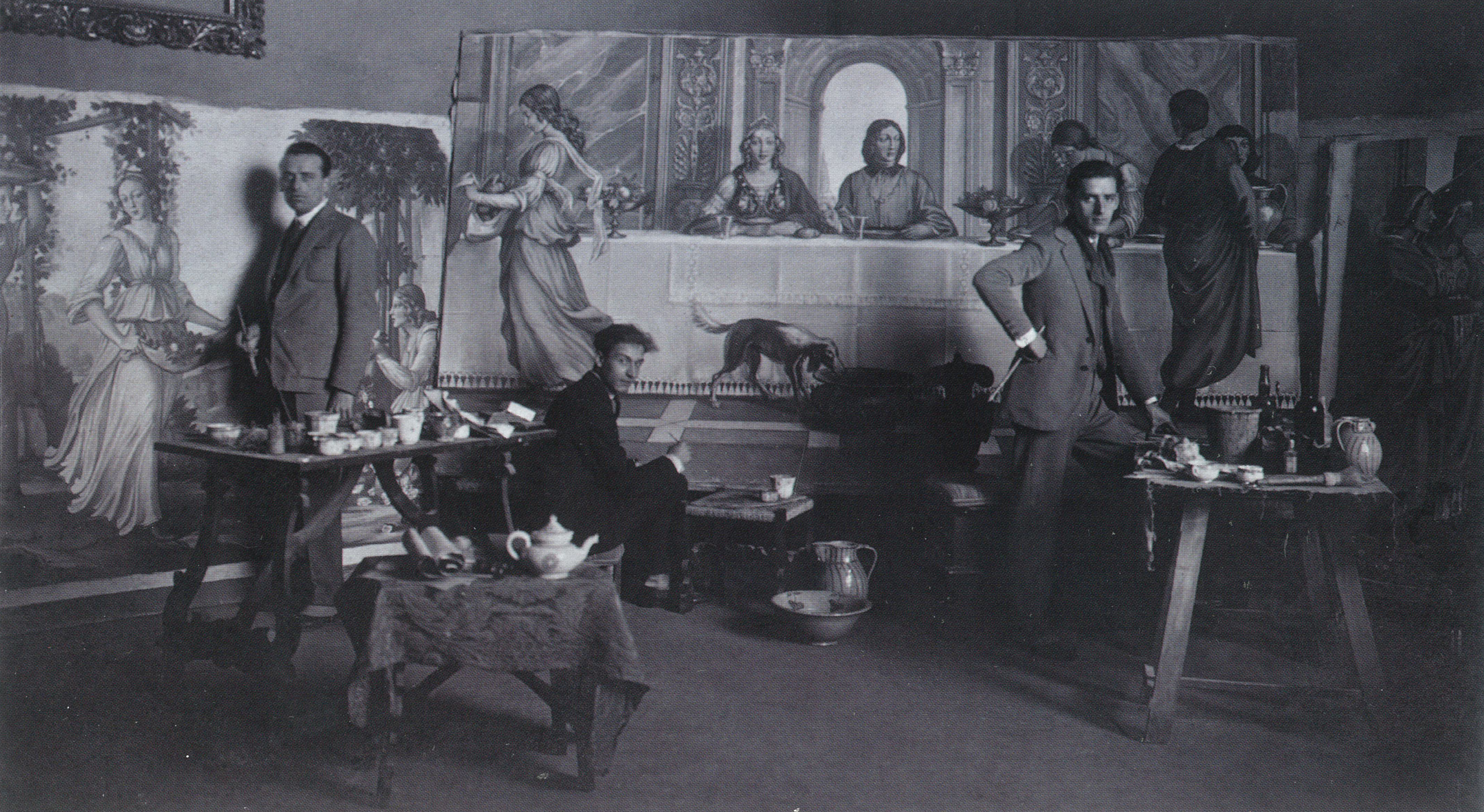 La Bottega dei fratelli Federigo, Achille e Alberto Angeli a Firenze, negli anni Venti del Novecento